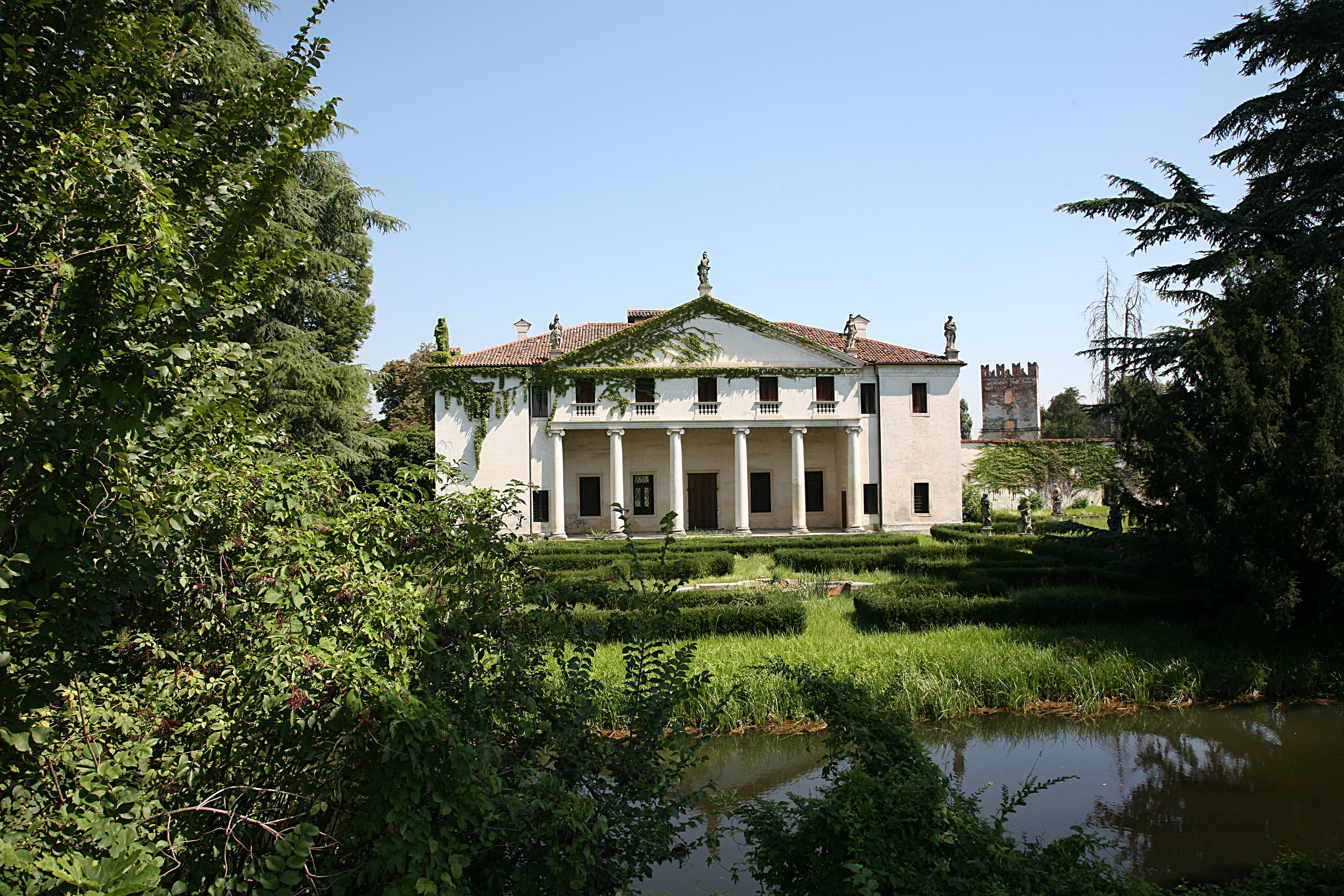 A villa in Bolzano Vicentino just outside Vicenza by Andrea Palladio.